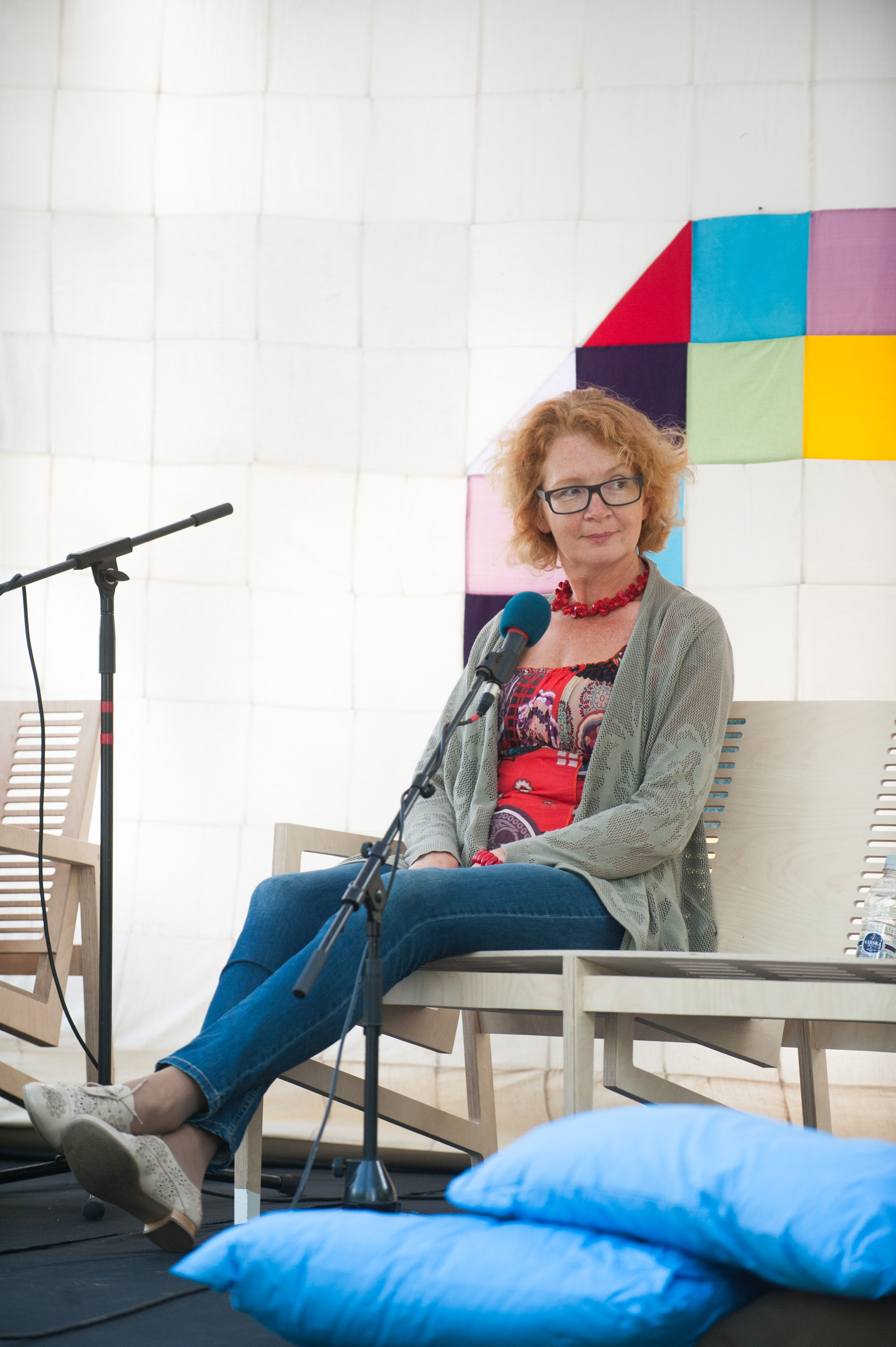 Arvamusfestival 2014: "Ärge õpetage mind elama, andke parem raha"